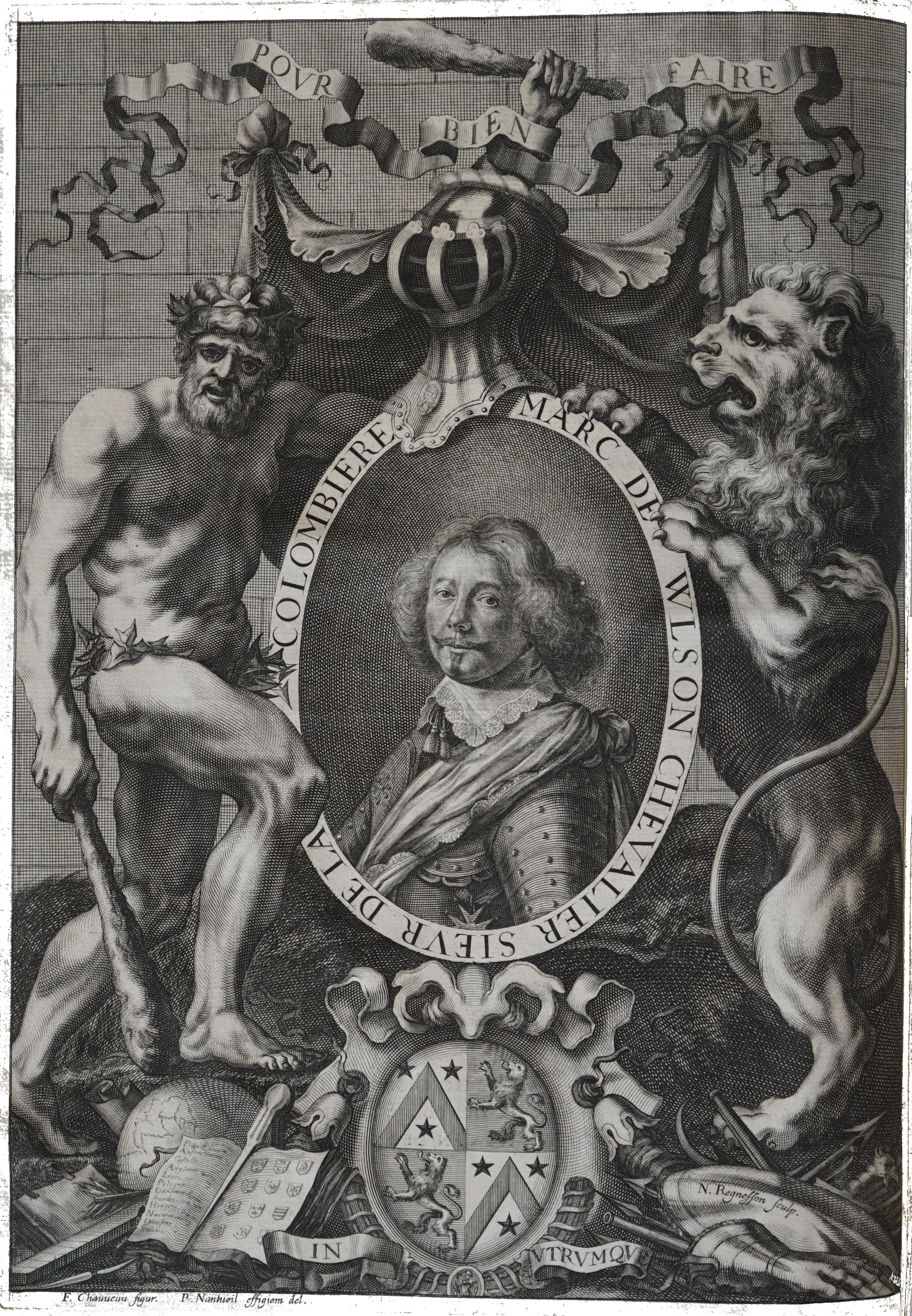 extrait du "Théâtre d'honneur..." par Vulson.